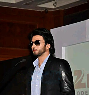 Abbas at Zindagi Channel Launch.